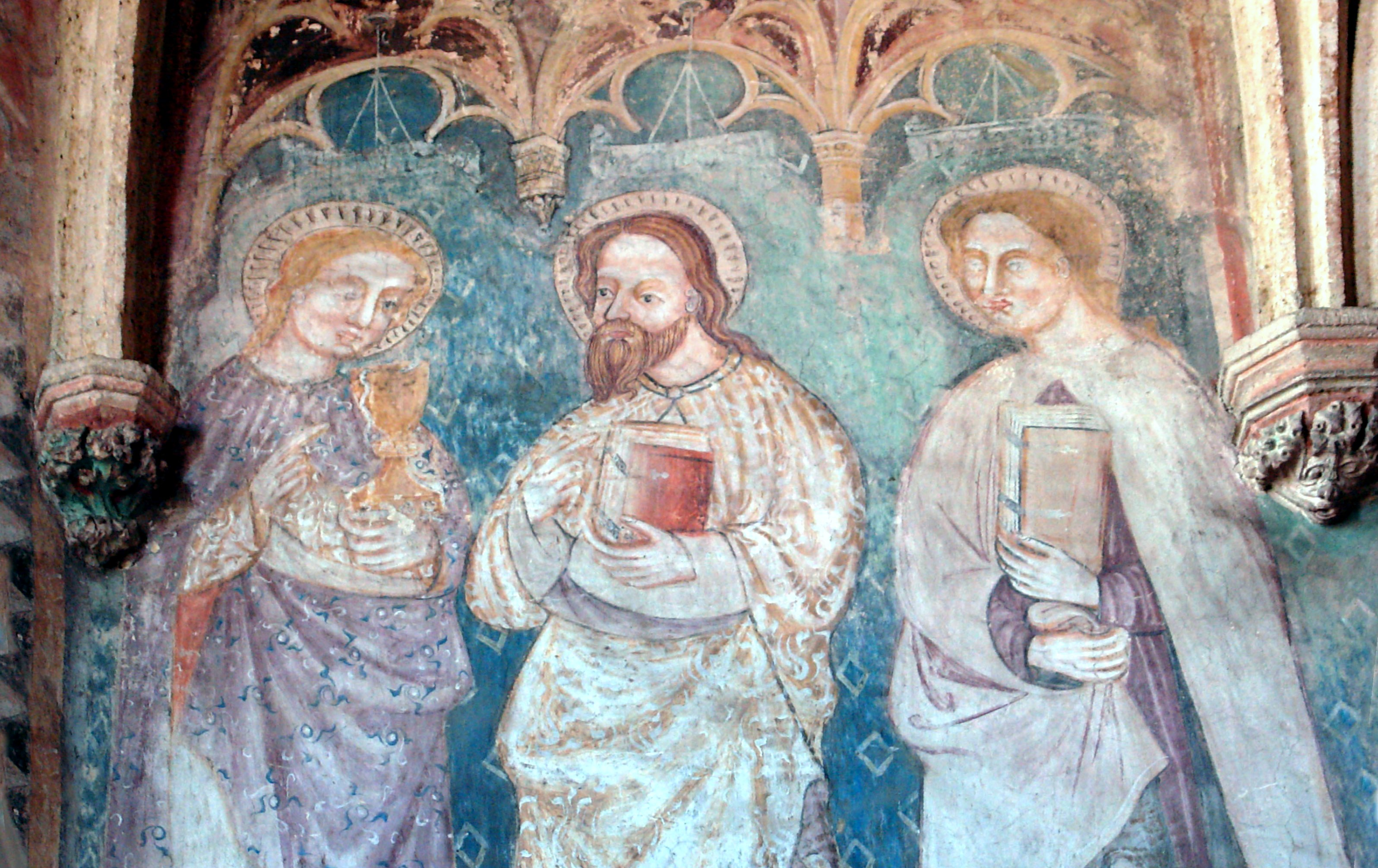 Mártonhely, Szent Márton templom, - freskórészlet a szentélyben